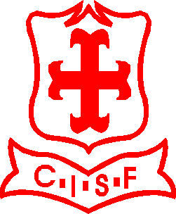 Diseño del primer escudo utilizado por la institución.